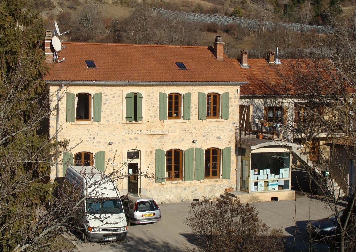 Saint-Auban-d'Oze (Hautes-Alpes) : l'école communale.